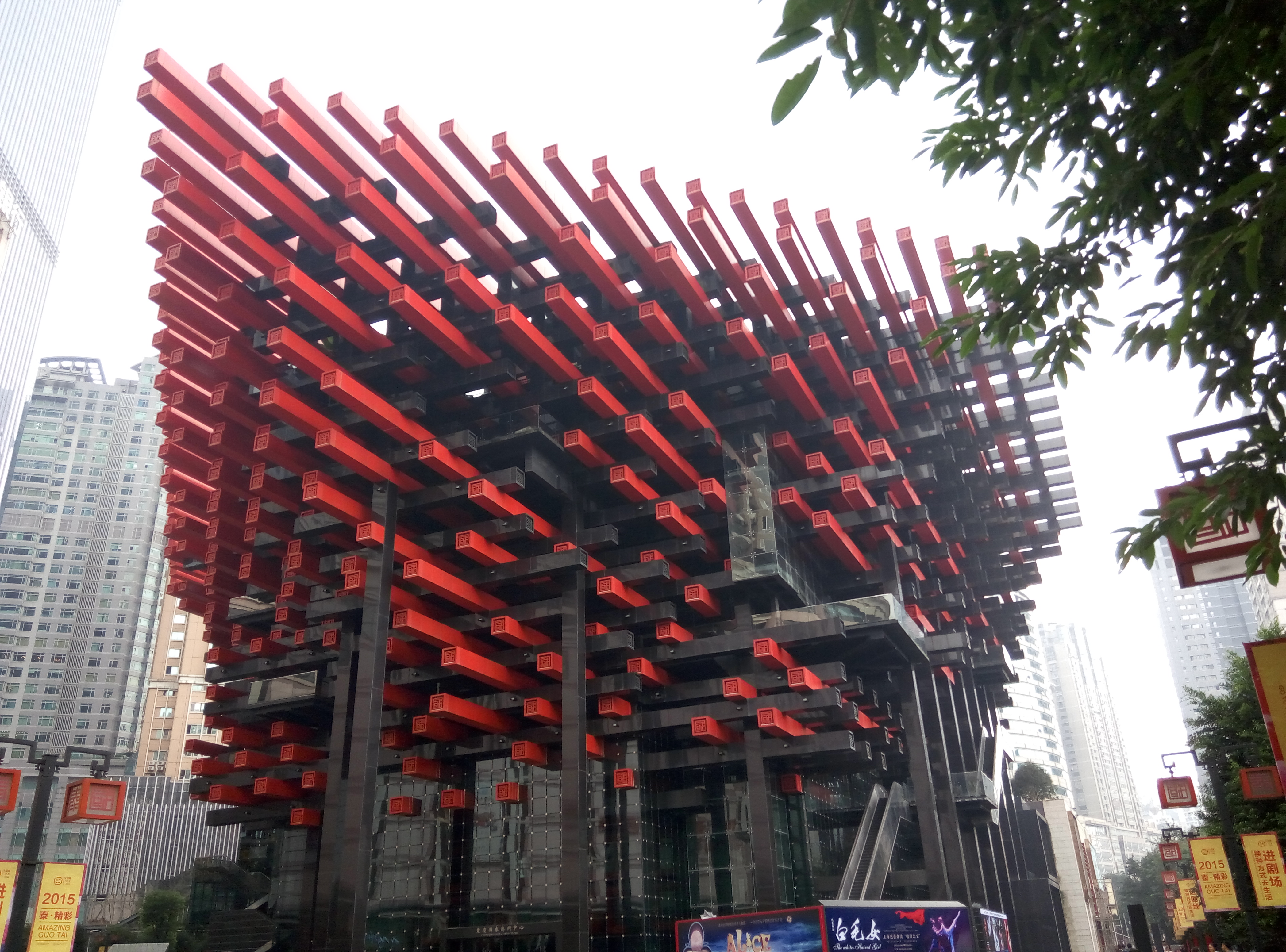 粵語: 重慶藝術館